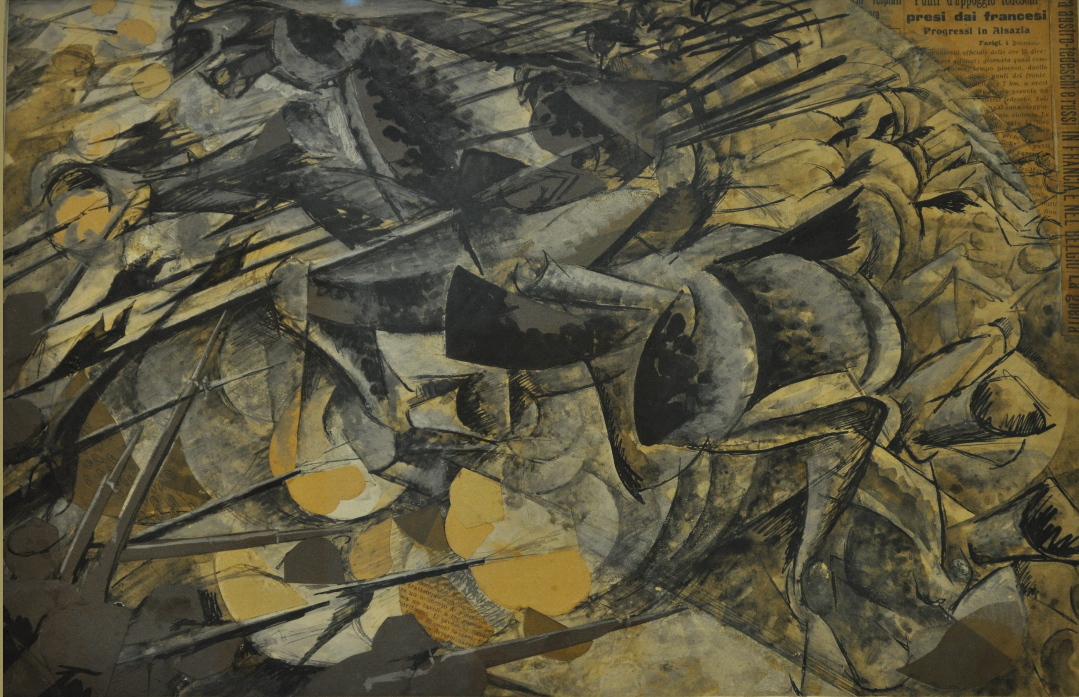 Carica di lancierilabel QS:Lit,"Carica di lancieri"